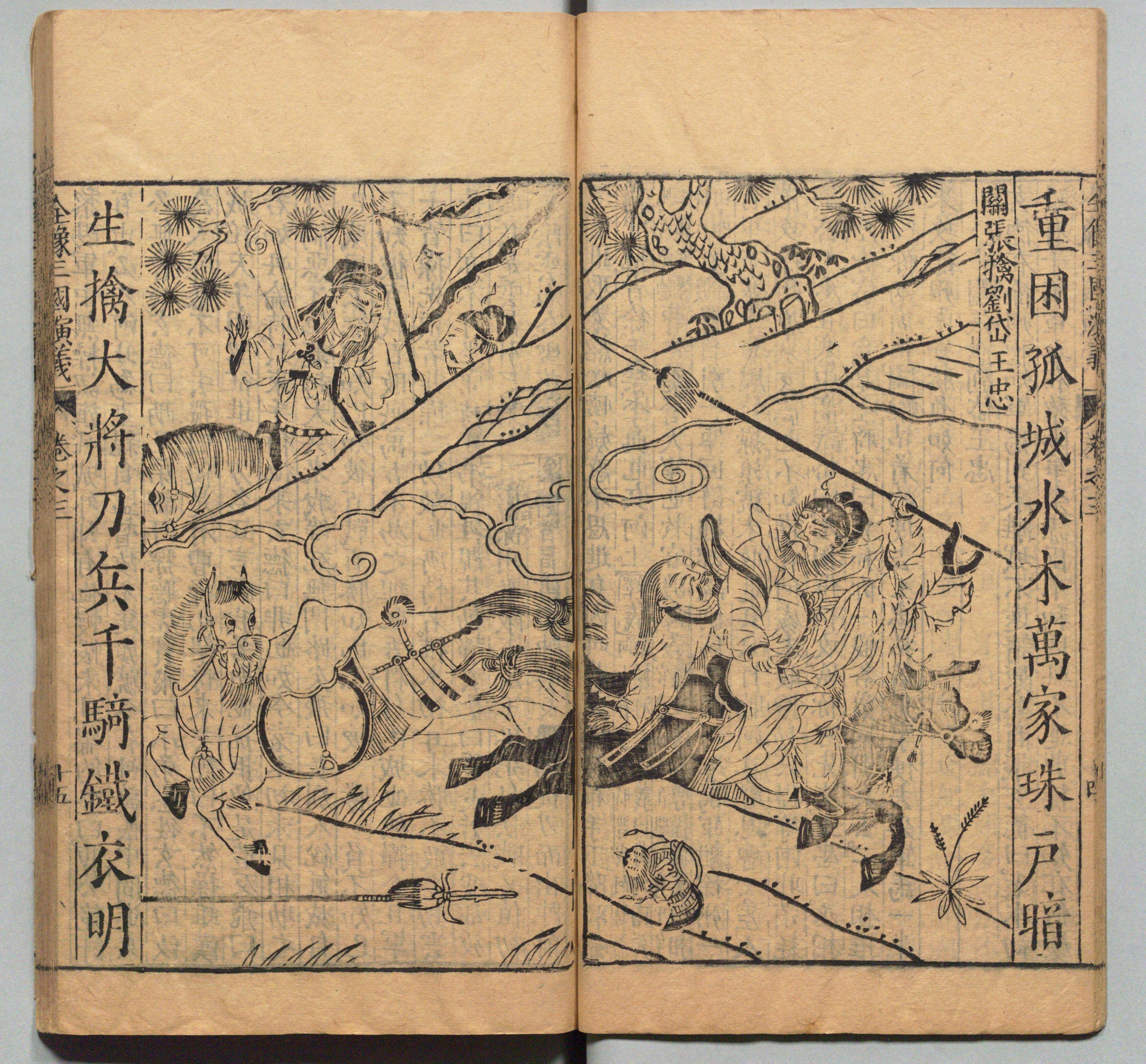 新刊校正古本大字音释三国志通俗演义 明万历十九年书林周曰校刊本